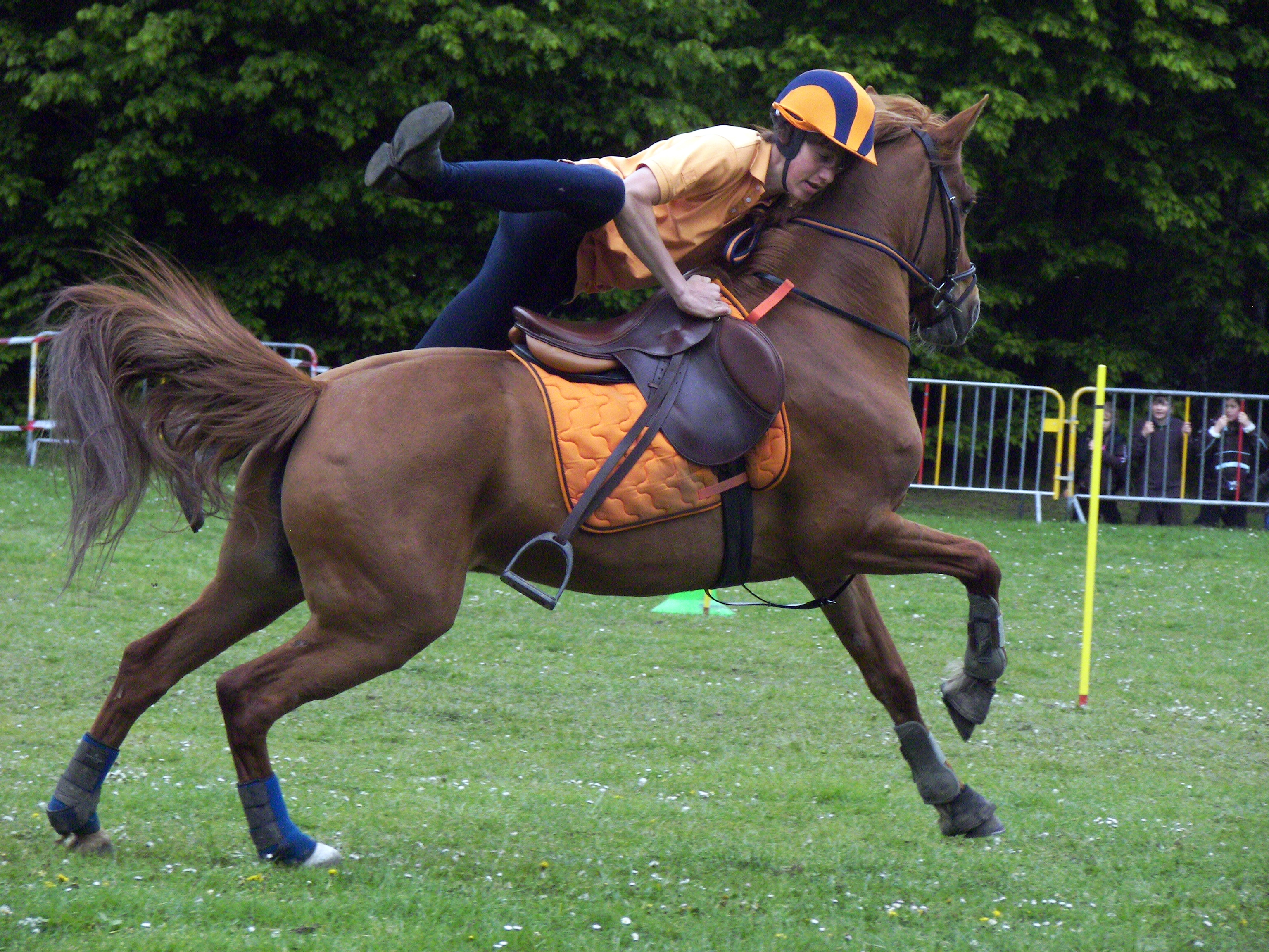 A-terre A-cheval: Le cavalier remonte sur son cheval au trop ou au galop. L'a-terre a-cheval est une des spécialité du Pony-Games. Photo prise lors du Challenge des Cht'is, international de Pony-Games organisé près de Valenciennes.